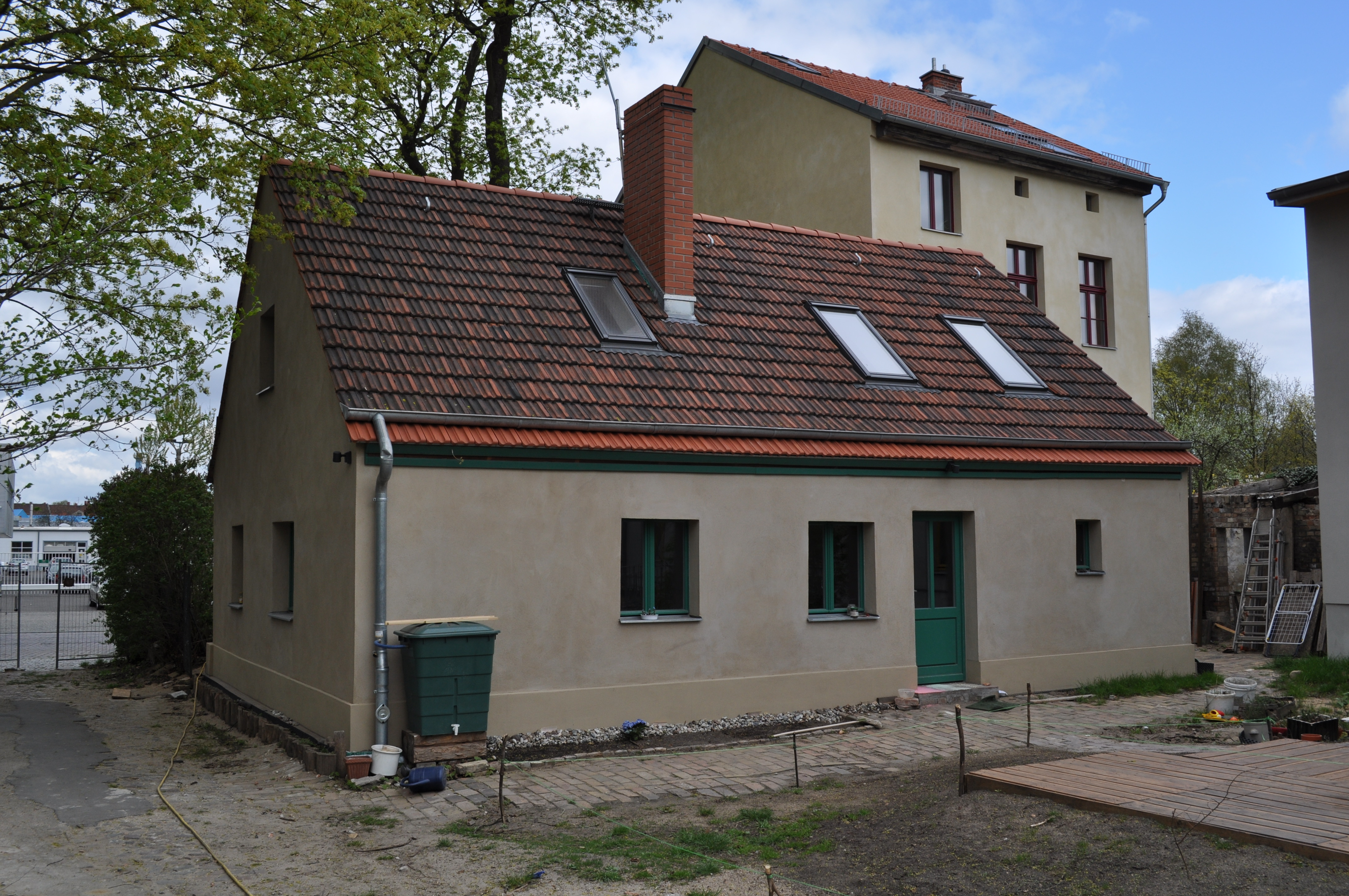 Denkmalgeschütztes Objekt Deutschland Berlin Nummer 09030386 Koloniestraße 57 Kolonistenhaus, 1782, Hofseitig